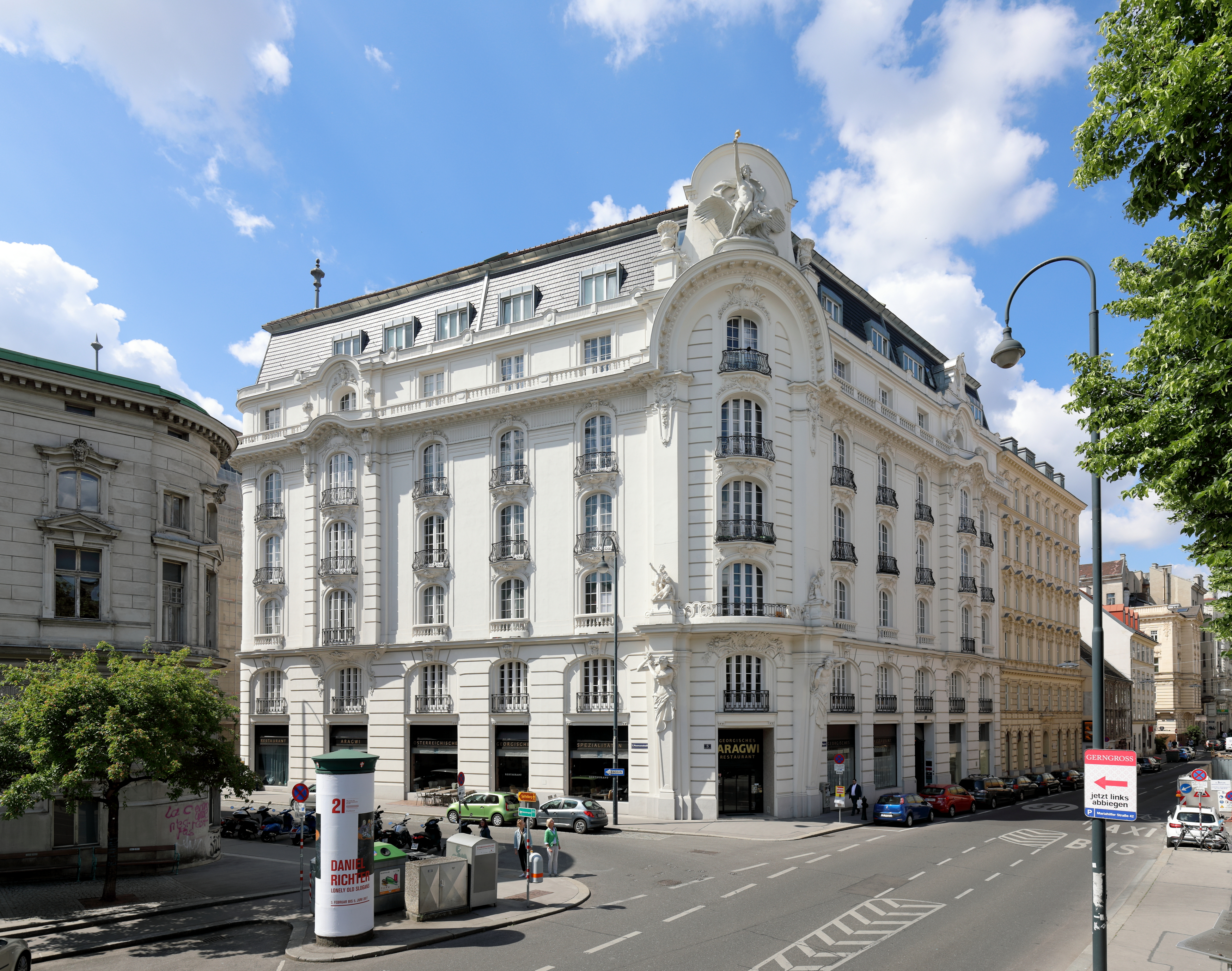 Das Weghuberhaus Ecke Museumstraße 5 / Neustiftgasse 3 im 7. Wiener Gemeindebezirk Neubau.Der Wohnblock mit monumentaler späthistoristischer Fassade wurde gemeinsam mit dem Gebäude Museumstraße 3 (früher Hofstallstraße) nach Plänen des Architekten Rudolf Erdös von 1910 bis 1911 errichtet. Benannt ist es nach dem Kaffeesieder Albert Weghuber bzw. nach dem ehemaligen Café Weghuber.